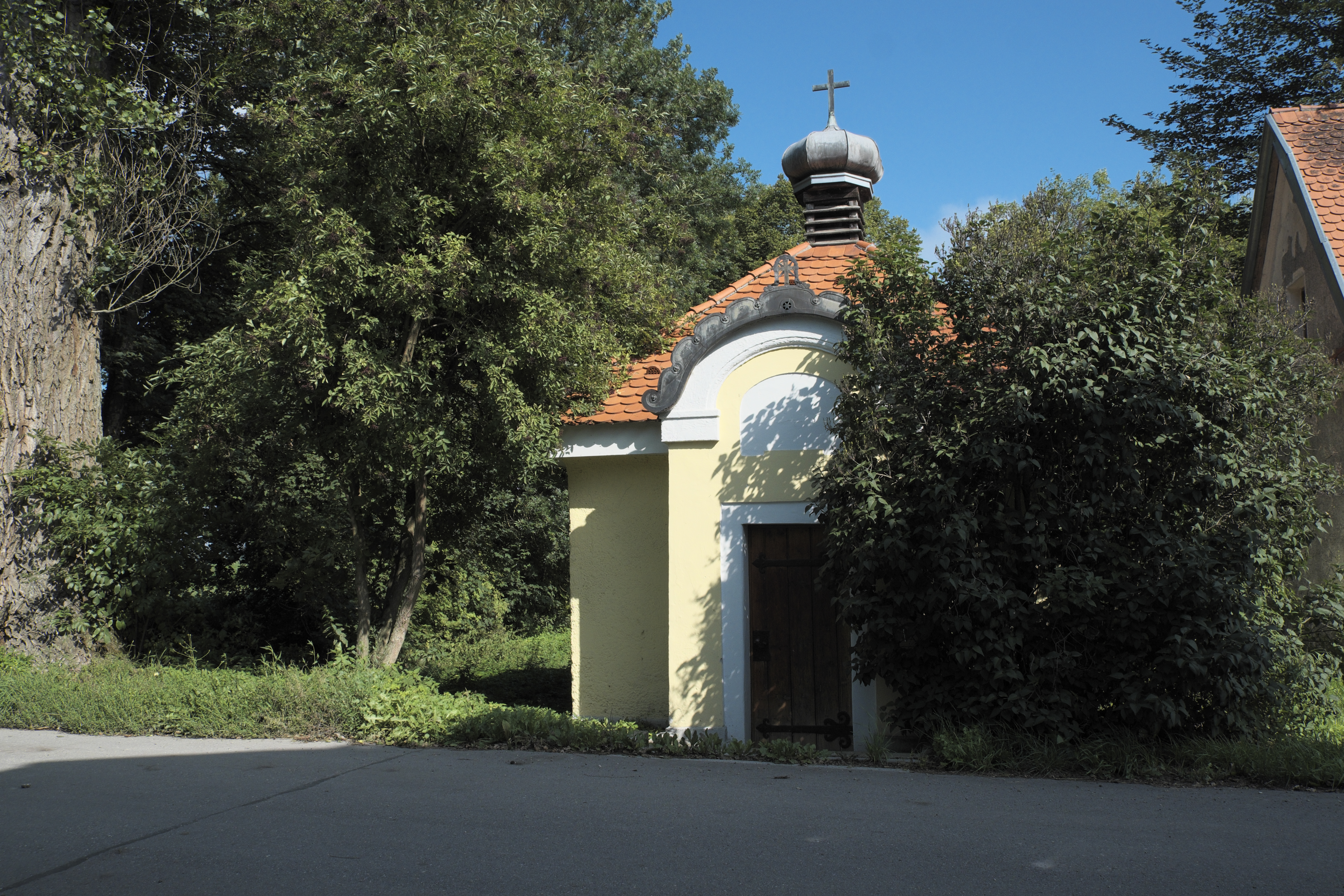 Hofkapelle des Goldachhofes in Ismaning im Landkreis München (Bayern/Deutschland)